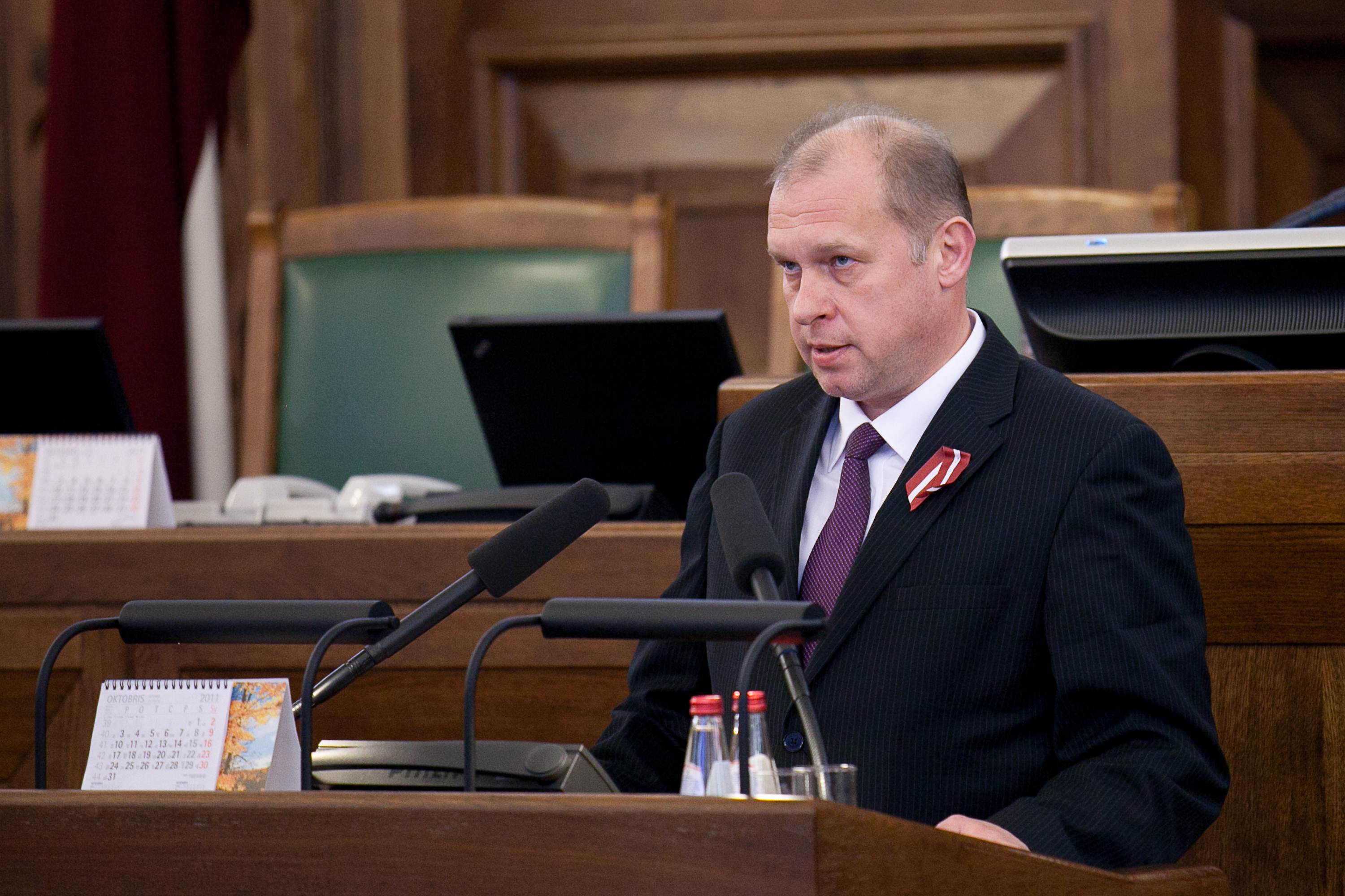 2011.gada 17.oktobris. Deputāts Raimonds Rubiks dod svinīgo solījumu. Foto: Ernests Dinka, Saeimas Kanceleja